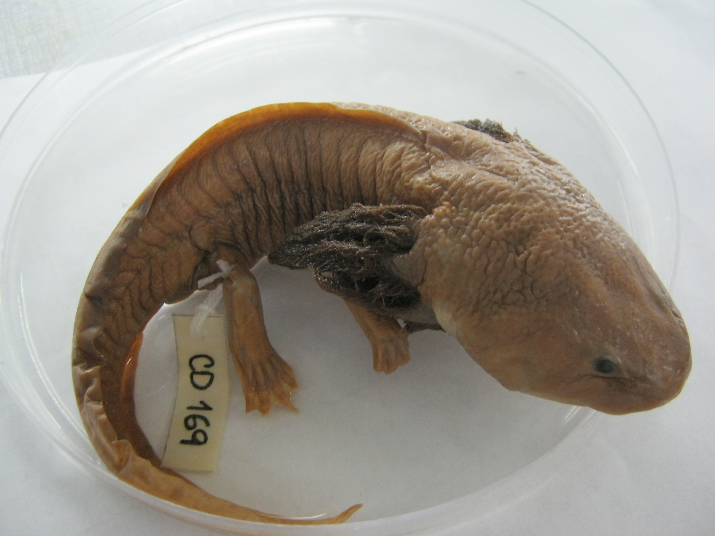 El axolotl el Monstruo acuaticoEsperanto: La aksolotlo la akva monstro